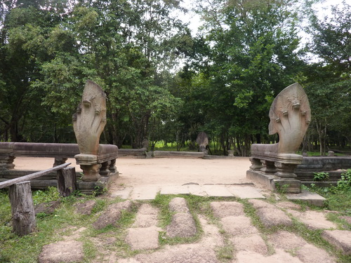 Бенг Мелеа находится недалеко от Ангкора